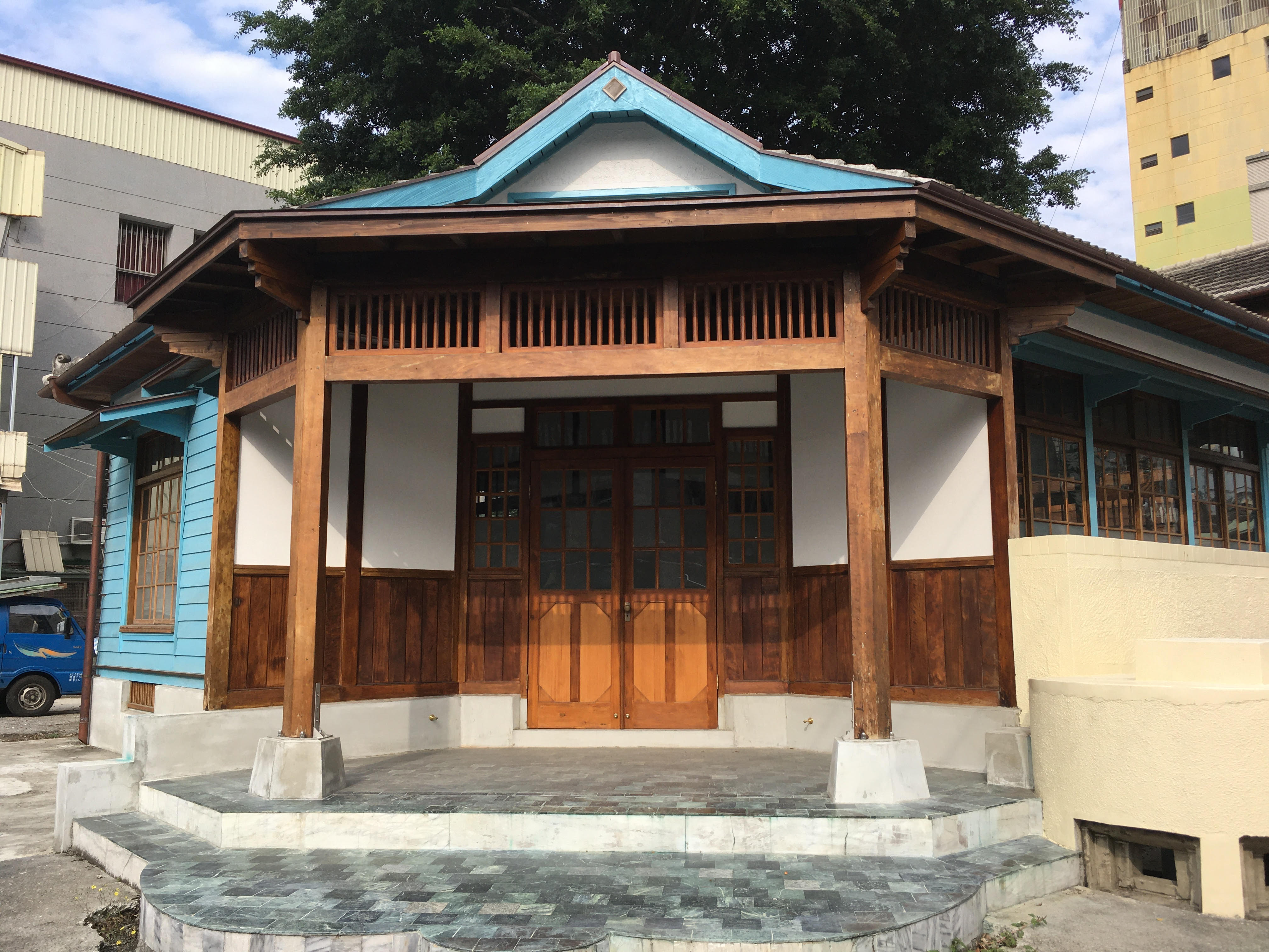 嘉義東門町派出所